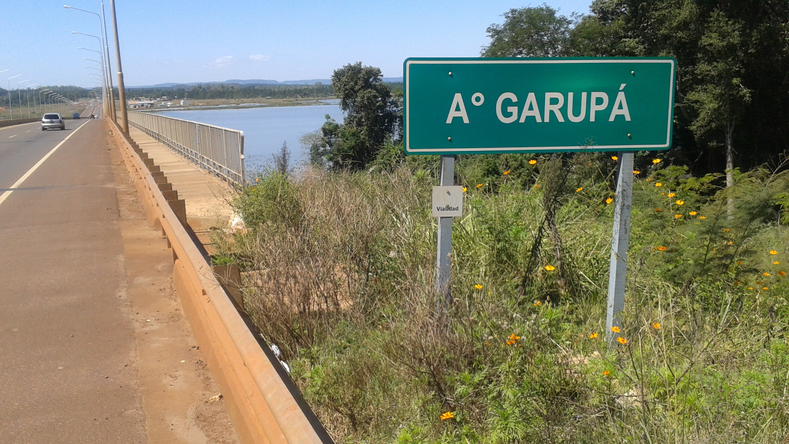 Cartel Arroyo Garupá (Provincia de Misiones, Argentina)